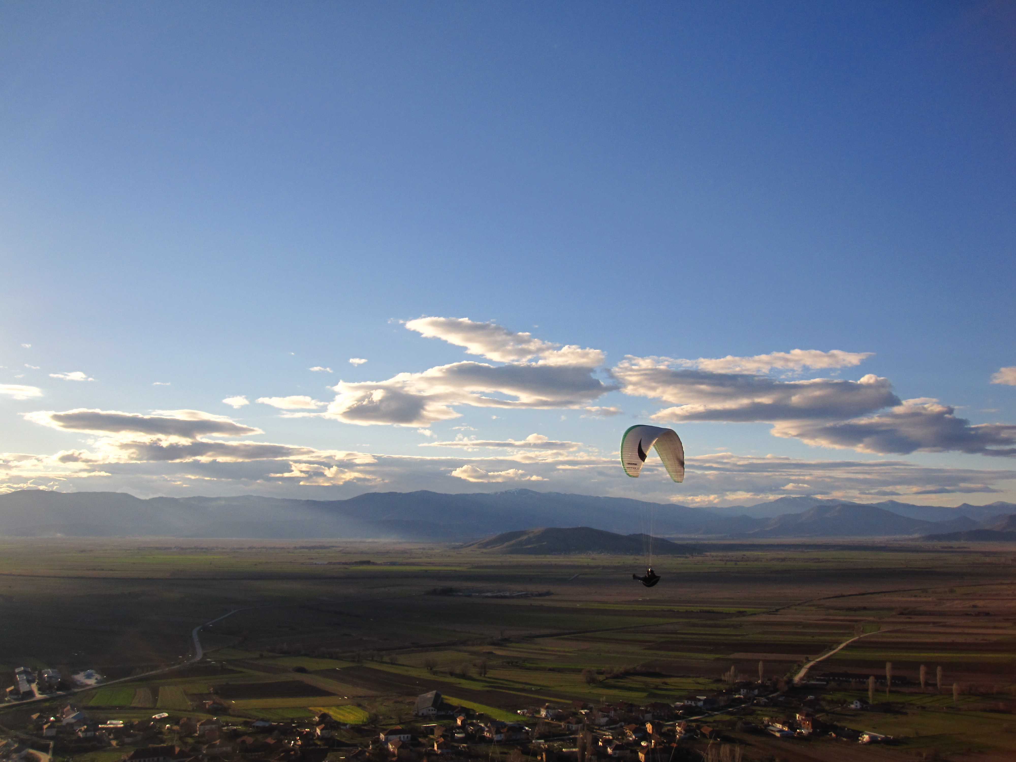 Параглајдер лета над с. Мажучиште, Прилеп. Фотографија направена од околниот рид.